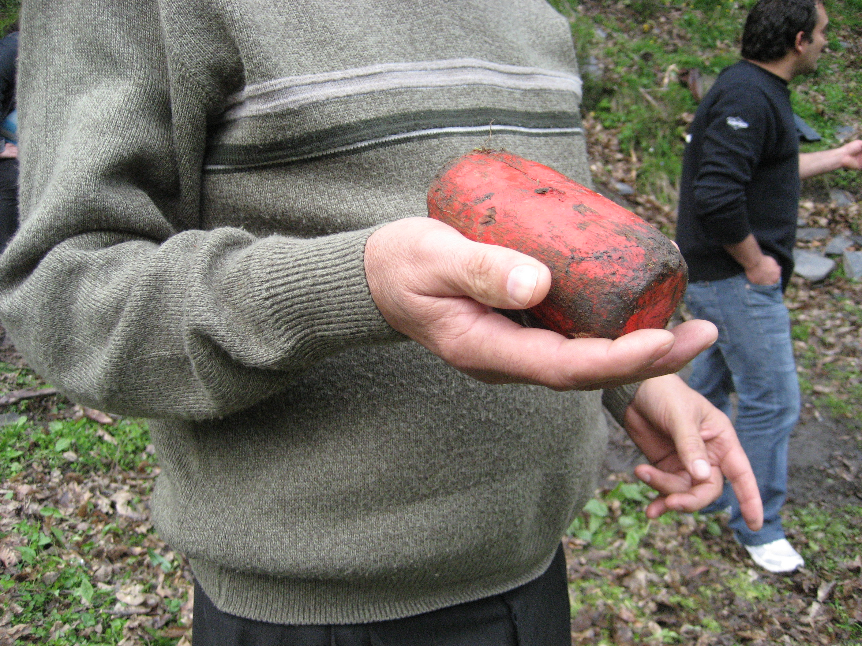 Bolo. Elemento para golpear los "boliches" en el juego tradicional llamado "Bolos Bercianos"